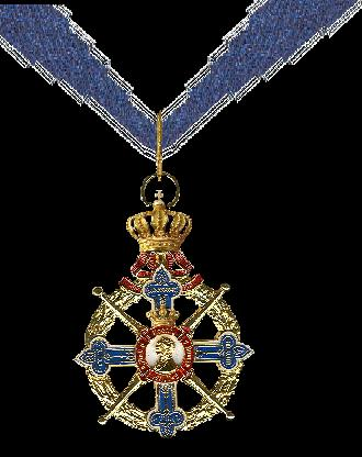 kruis uit mijn verzameling. Eigen scan